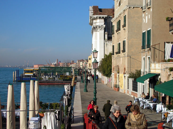 La passeggiata delle "Zattere" a Venezia, all'altezza della chiesa dei Gesuati.